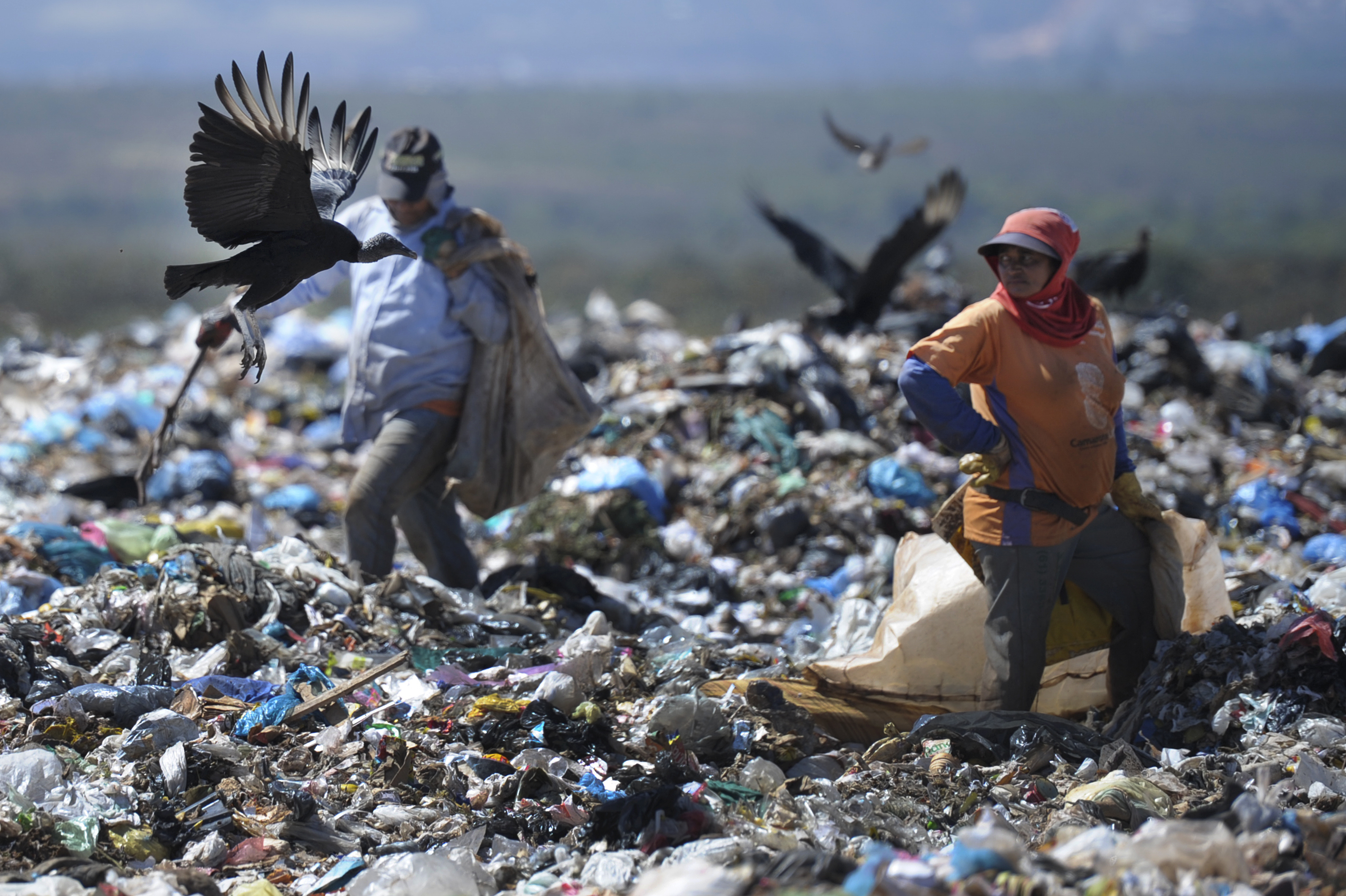 BIE - Banco de Imagens Externas. Lixão da Estrutural. Os municípios poderão ter mais dois anos e contar com recursos federais para se adaptarem à Política Nacional de Resíduos Sólidos, a lei que, entre outras mudanças, prevê o fim dos lixões. A decisão foi anunciada pelo senador Romero Jucá (PMDB-RR) durante o debate da MP 651/2014. Foto: Edilson Rodrigues/Agência Senado